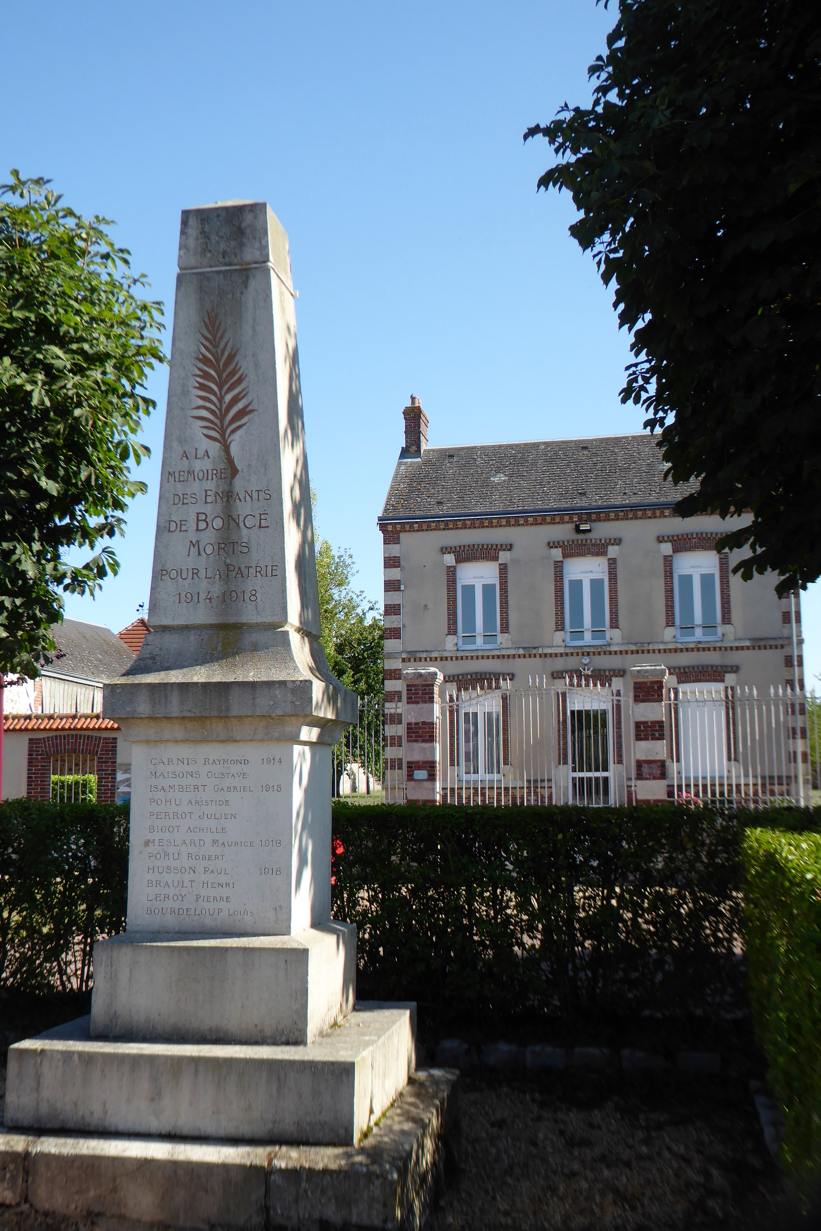 Monument aux morts et mairie de Boncé, Eure-et-Loir (France).